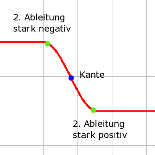 Kantendarstellung für Kantendetektion mit Verwendung der 2. Ableitung